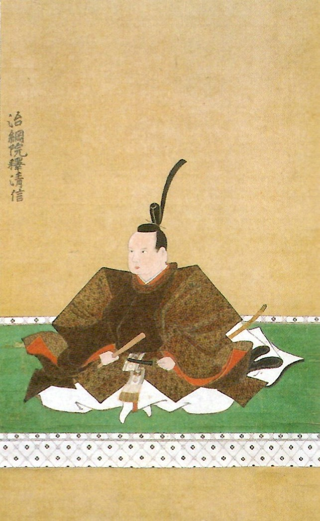 渡辺治綱の肖像。